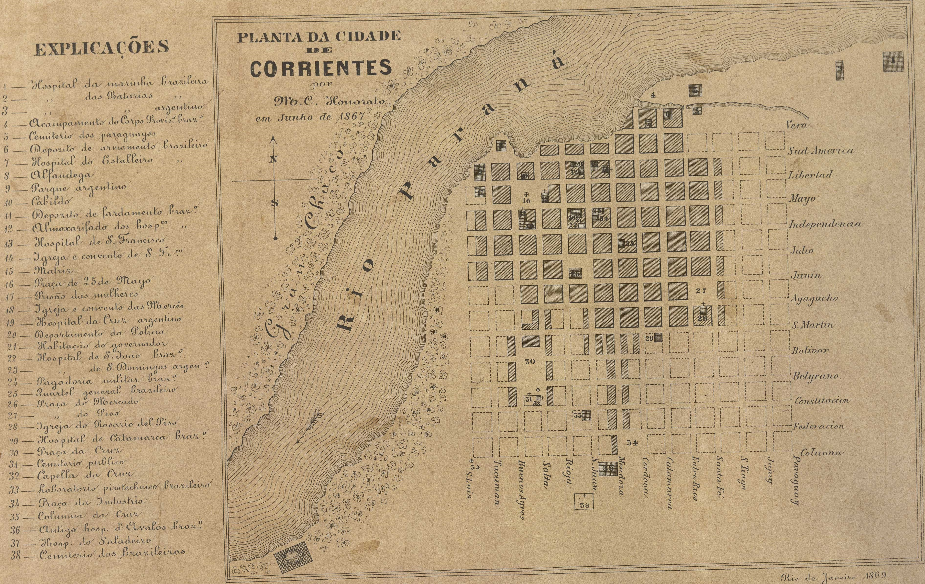 Planta da cidade de Corrientes